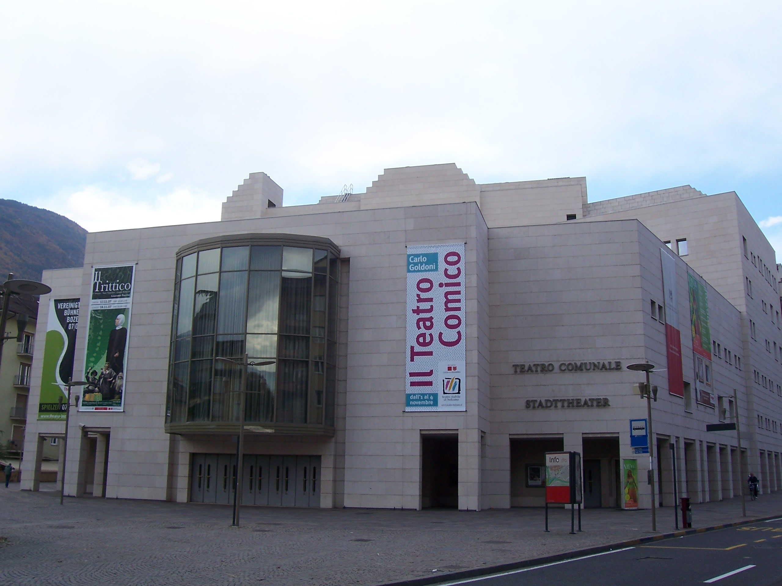 Nuovo Teatro Comunale di Bolzano - Neues Stadtteather Bozen - New Teatro Comunale in Bolzano